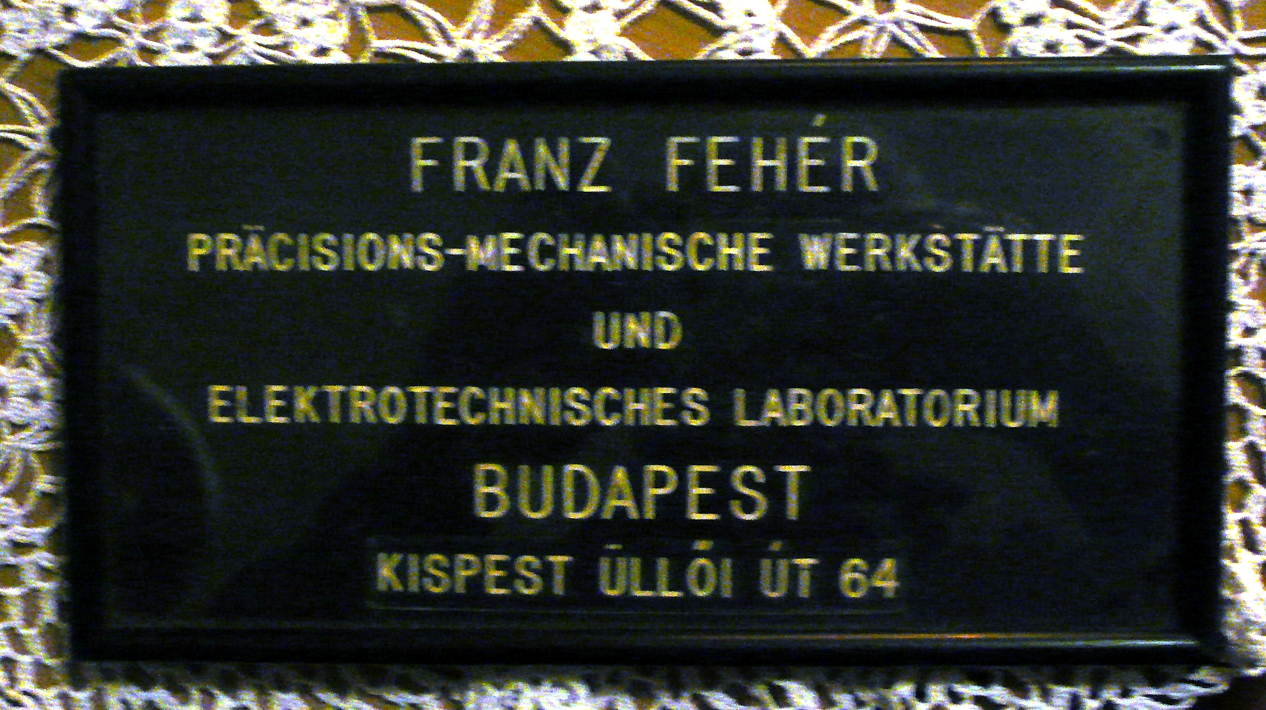 A Fehér Ferenc cég táblája